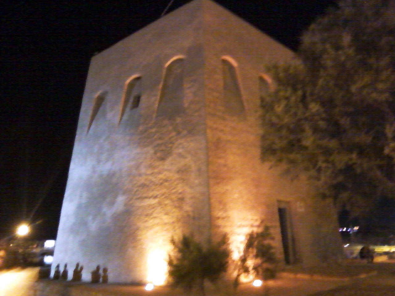 Torre San Foca di notte